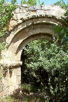 Calatañazor-San Juan Bautista La imagen es mía y la protejo bajo GFDL